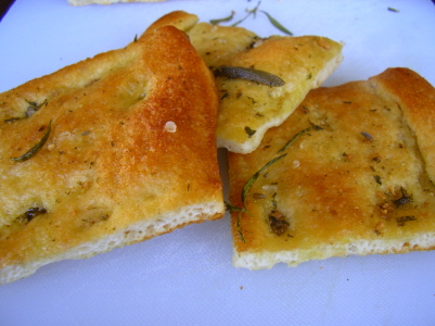 Focaccia